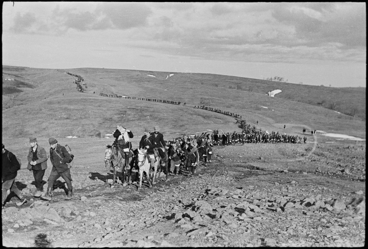 Усиљени марш 2. равногорског корпуса преко Пештерске висоравни уочи операције „Шварц" почетком маја 1943. године.